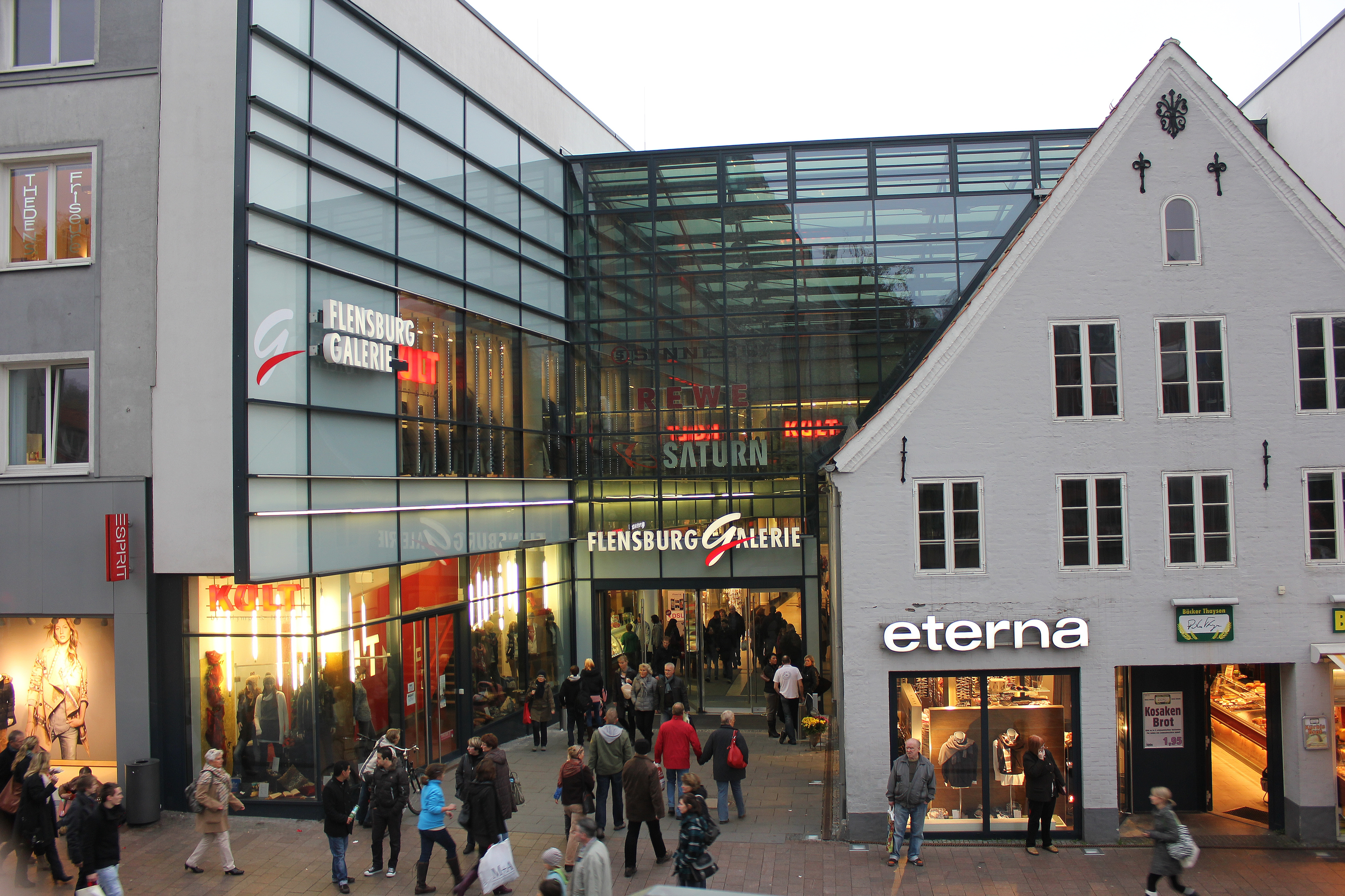 Flensburg Galerie (Eingang vom Holm mit dem Gebäude Holm 59 auf der rechten Seite)